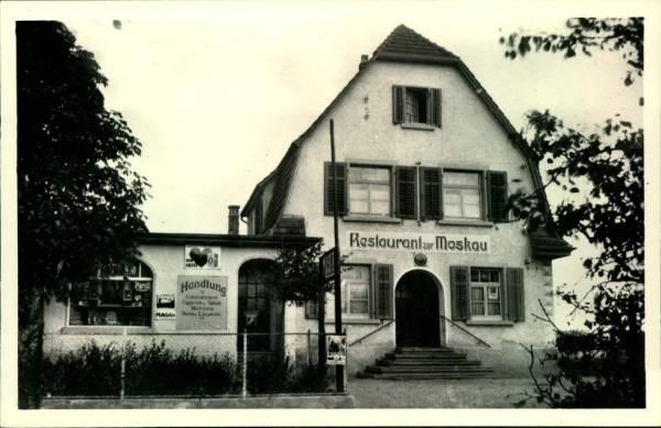 Restaurant zur Moskau Ramsen SH CH